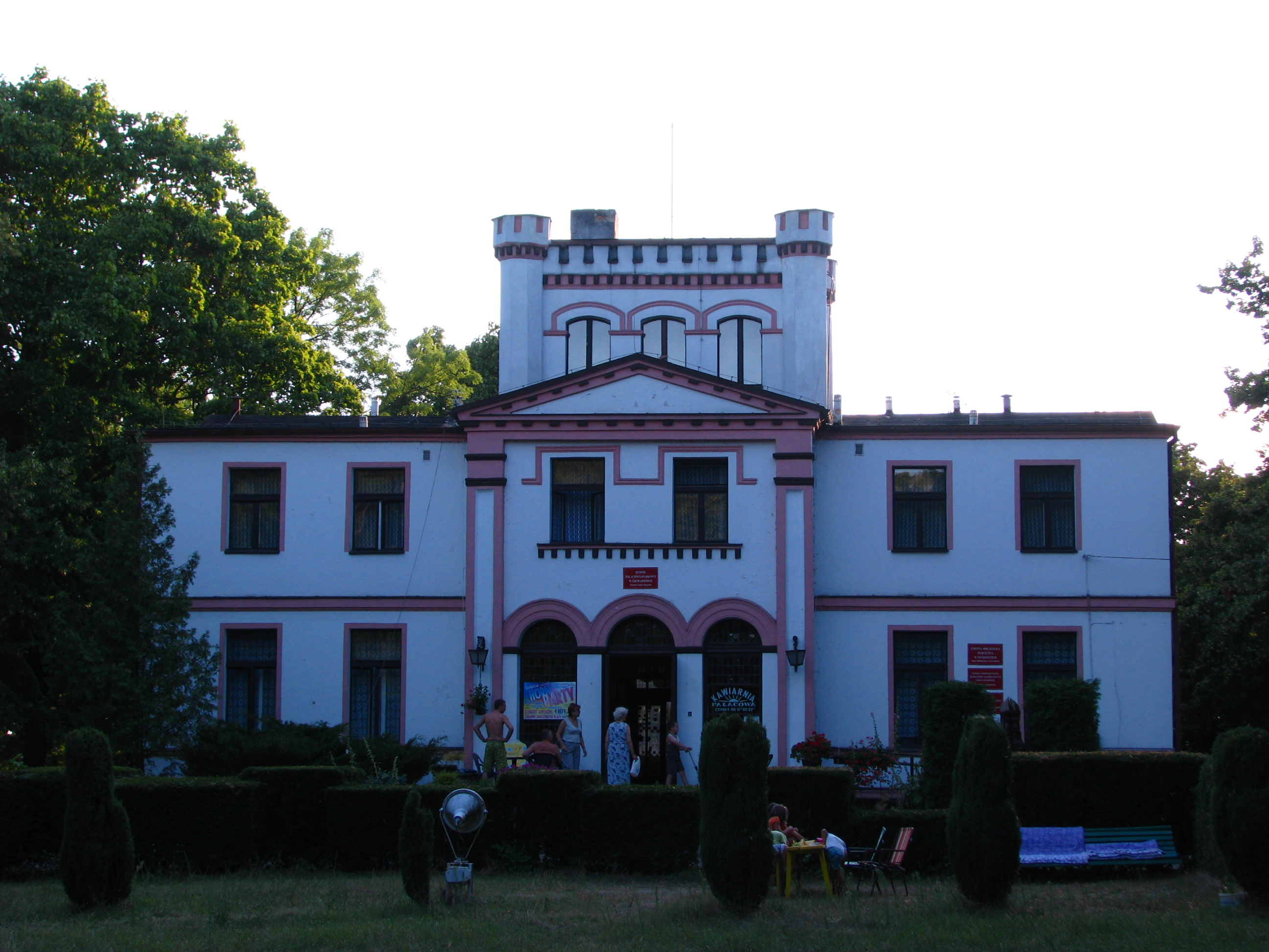 Pałac w Giewartowie, gmina Ostrowite